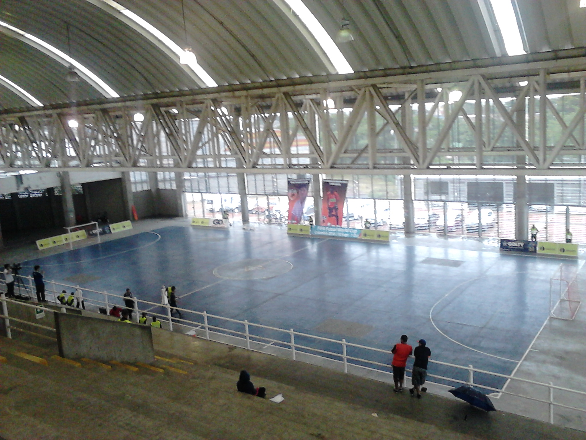 Coliseo Mariano Ramos en la Unidad Deportiva Mariano Ramos, Santiago de Cali.